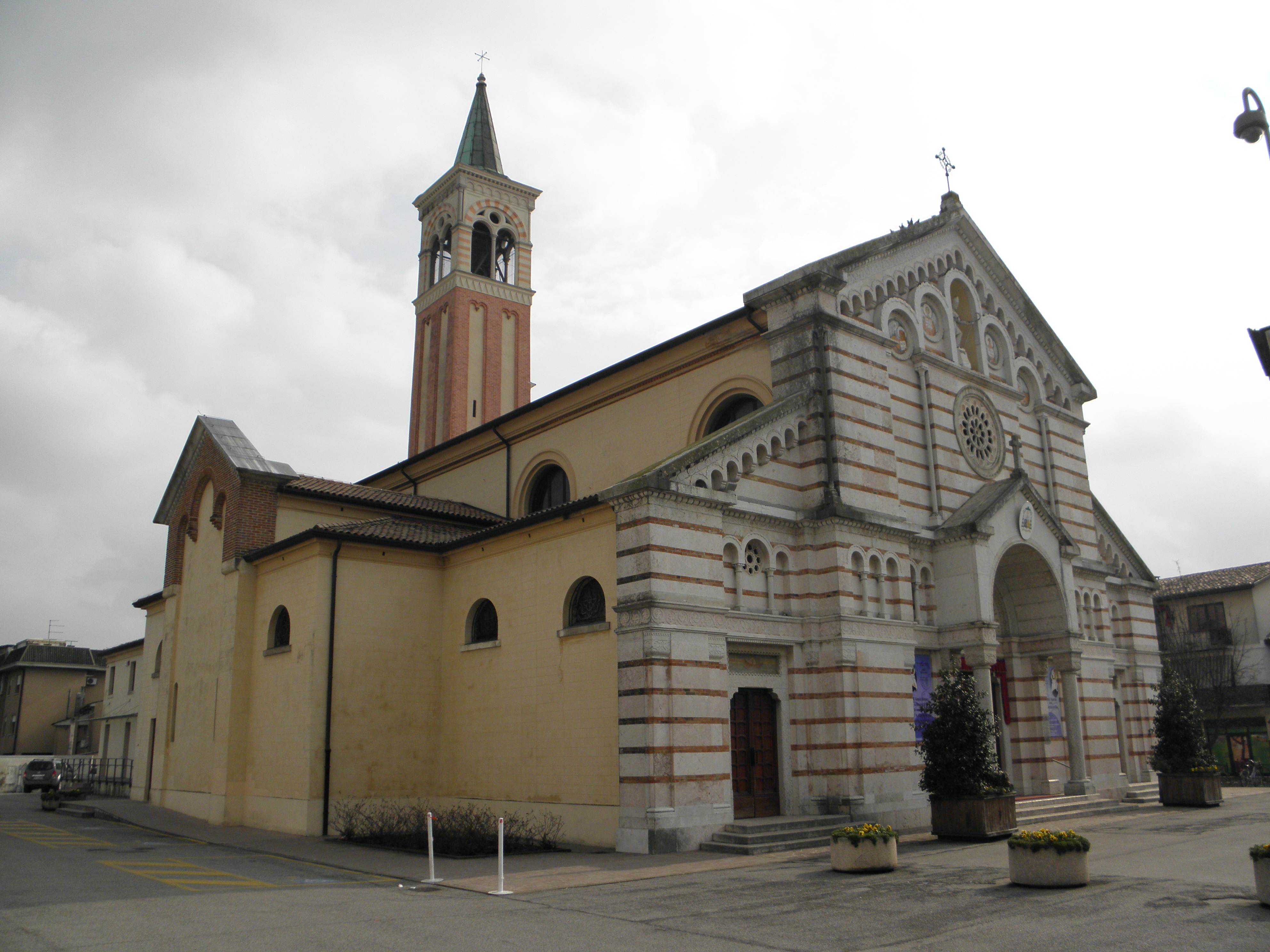 Paese: la chiesa parrocciale di San Martino Vescovo.